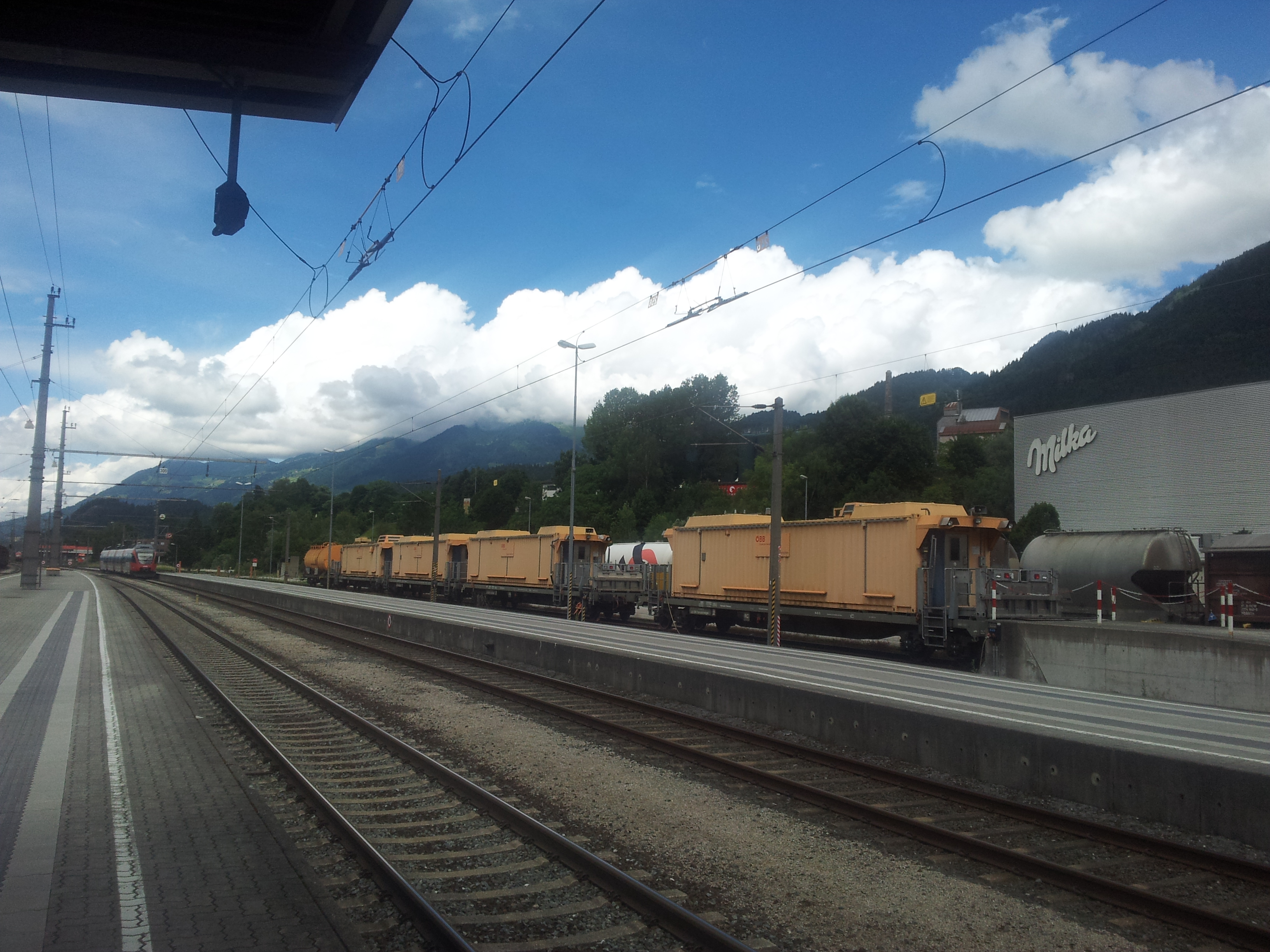 Quellwolken sitzen auf dem der Walserkamm auf, im Vordergrund der Tunnellöschzug im Bahnhof Bludenz